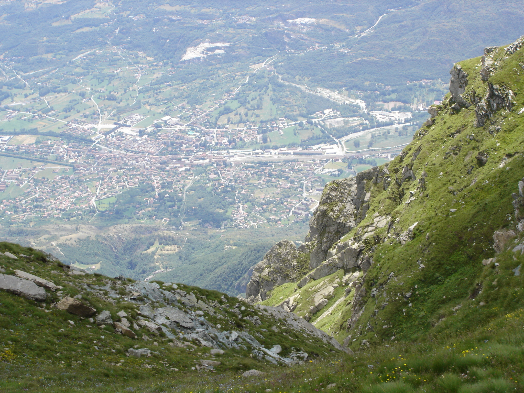 Bussoleno - Vista dal colle croce di ferro